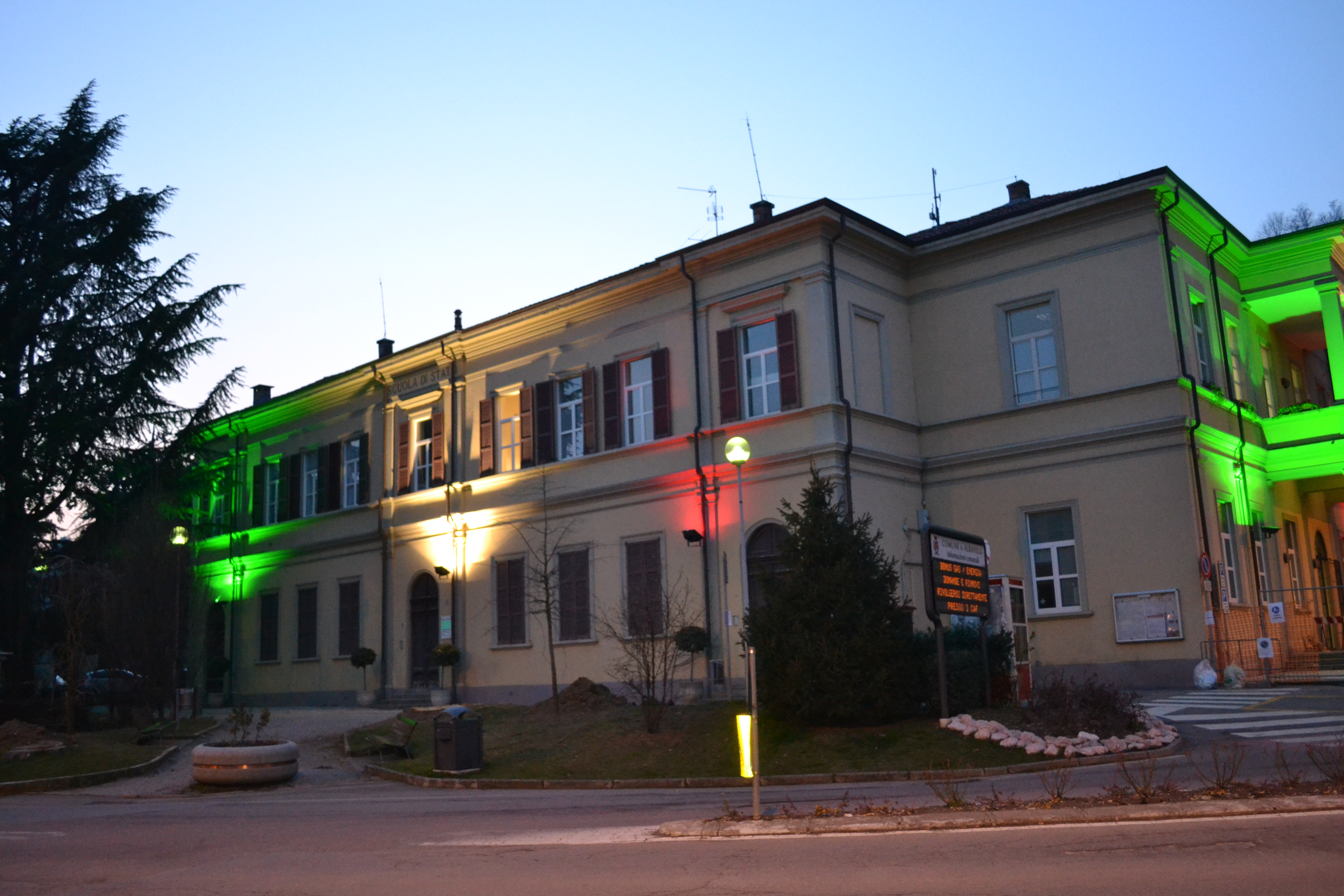 by Mark alba